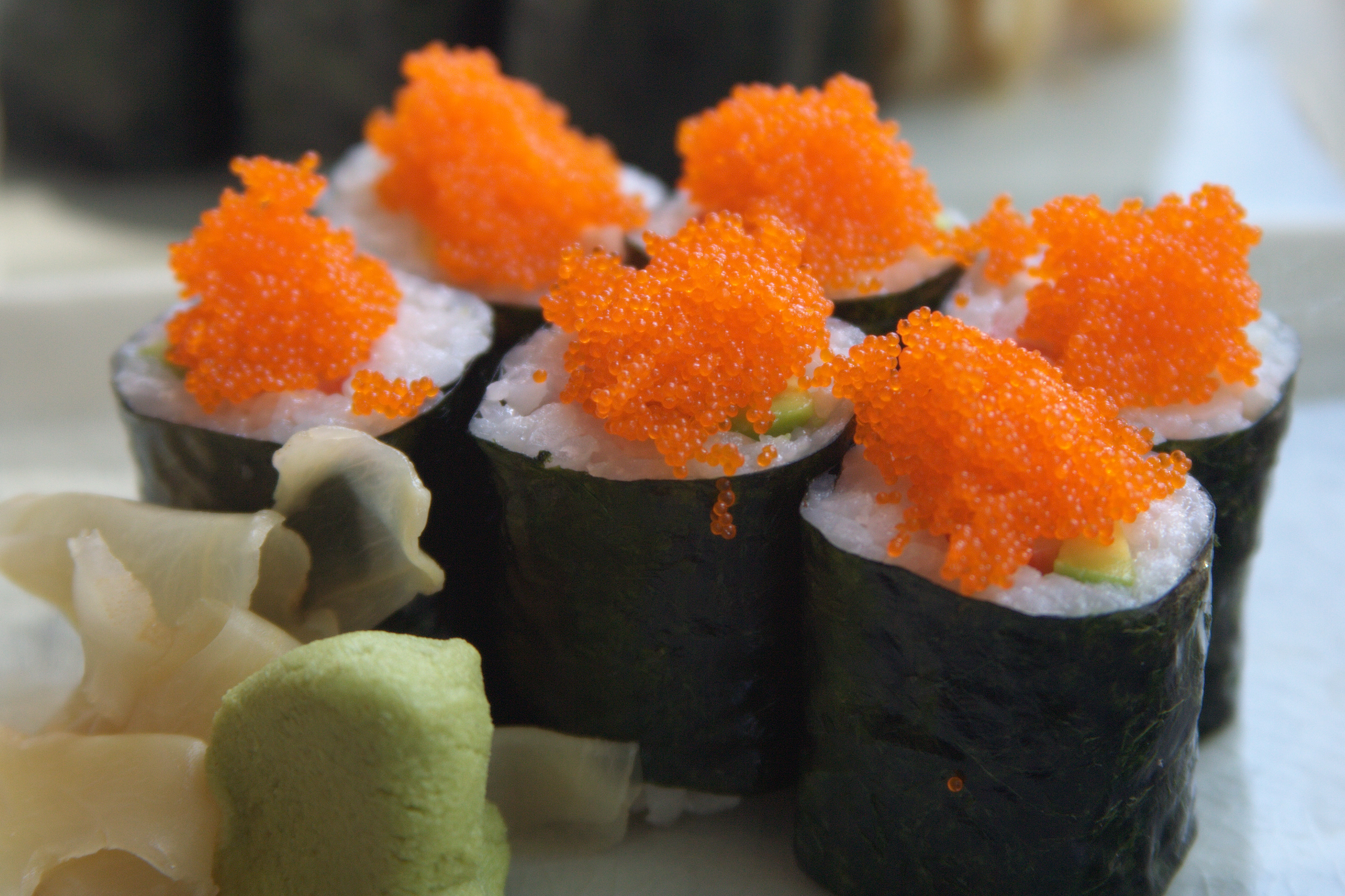 Makizushi (rolled sushi).